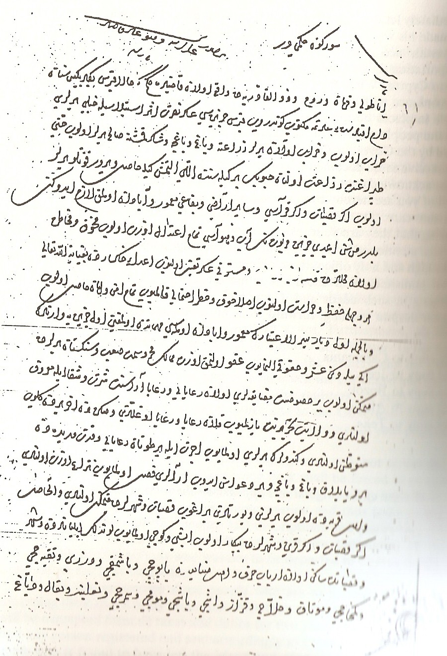 II. Selim'in Kıbrıs'a Türklerin yerleştirilmesini emreden 21 Eylül 1571 tarihli fermanının ilk sayfası. Bu fermanın kopyaları Karaman, İçel, Bozok, Alaiye ve Teke'ye gönderilmiştir.